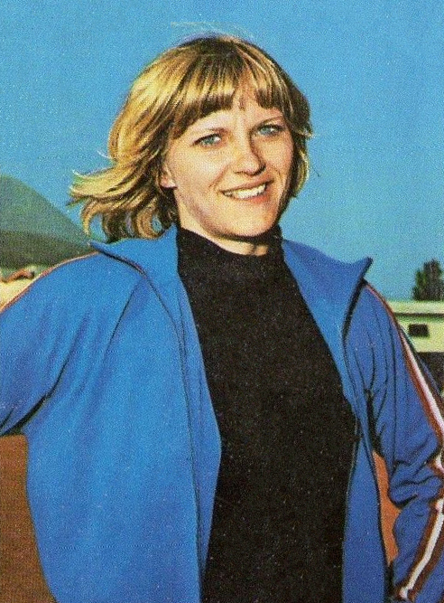 CAMPIONI dello SPORT 1973/74-Figurina n.60- GUSENBAUER - G.OVEST-ATL.LEGGERA-Rec